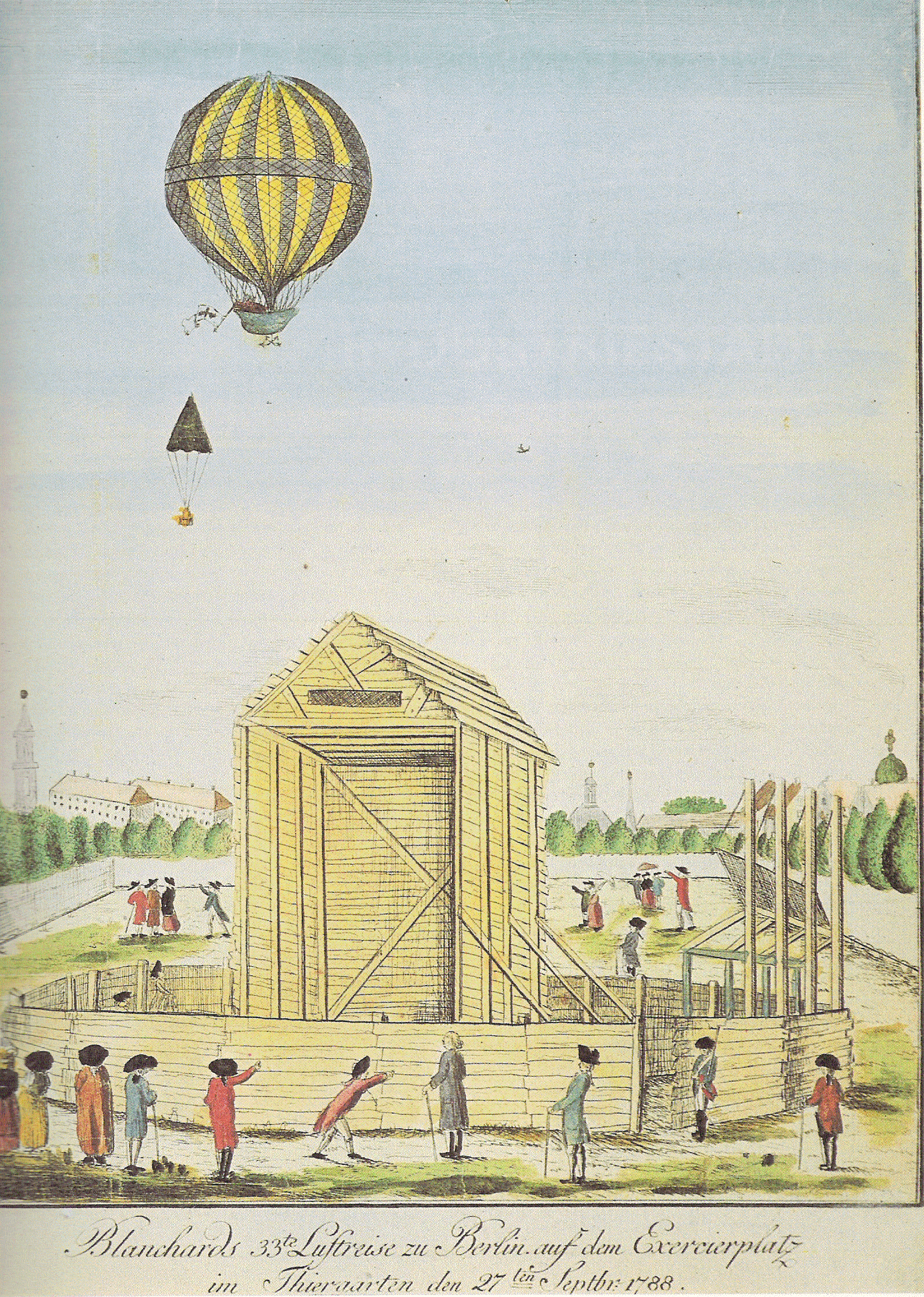 Ballonfahrt des Franzosen Blanchard am 27. September 1788 in Berlin.